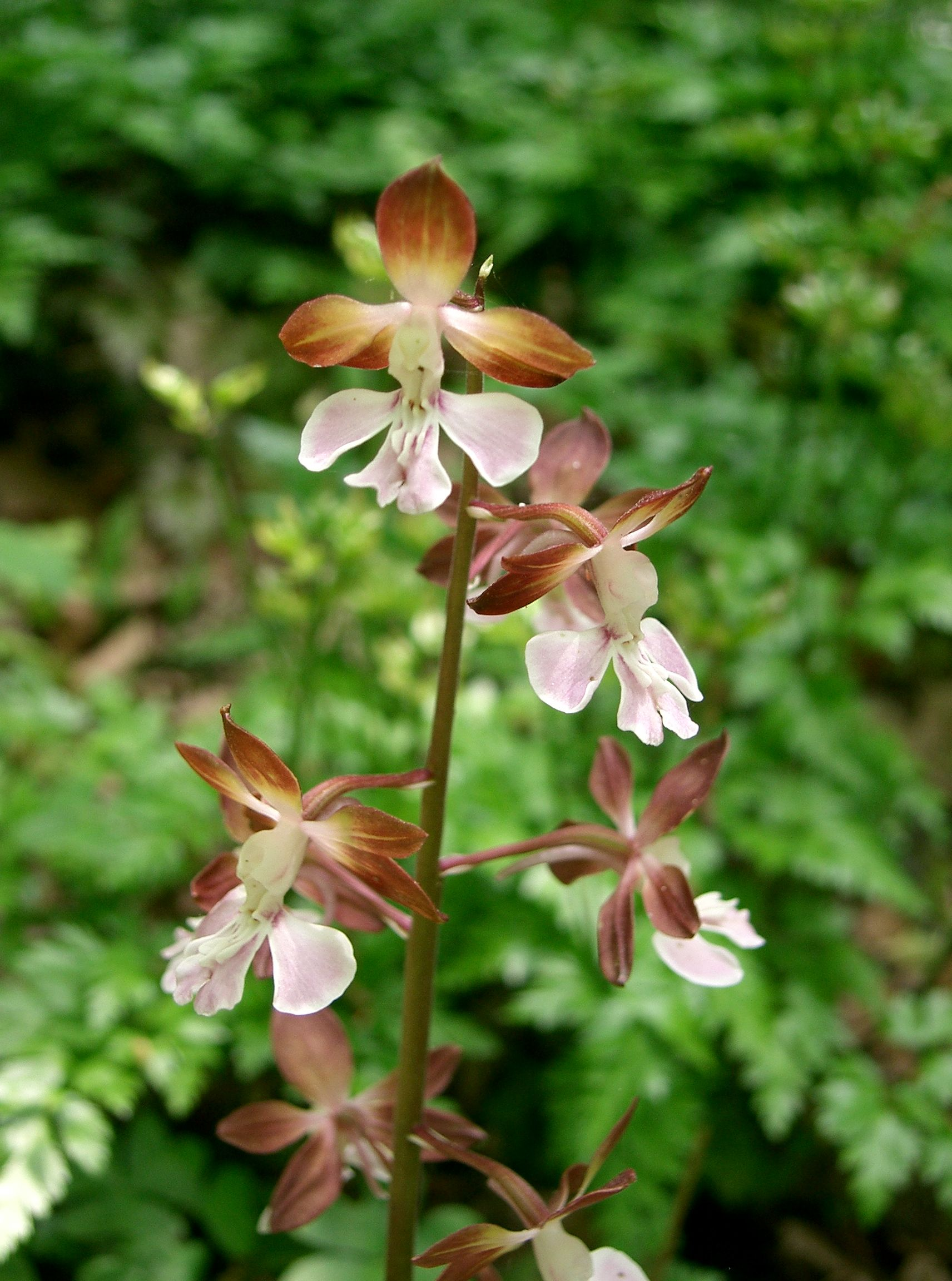 Scientific name Calanthe discolor